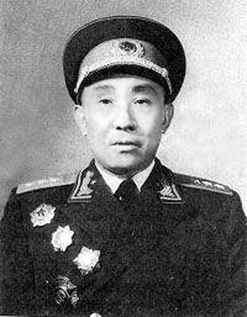 李聚奎1958年授衔照